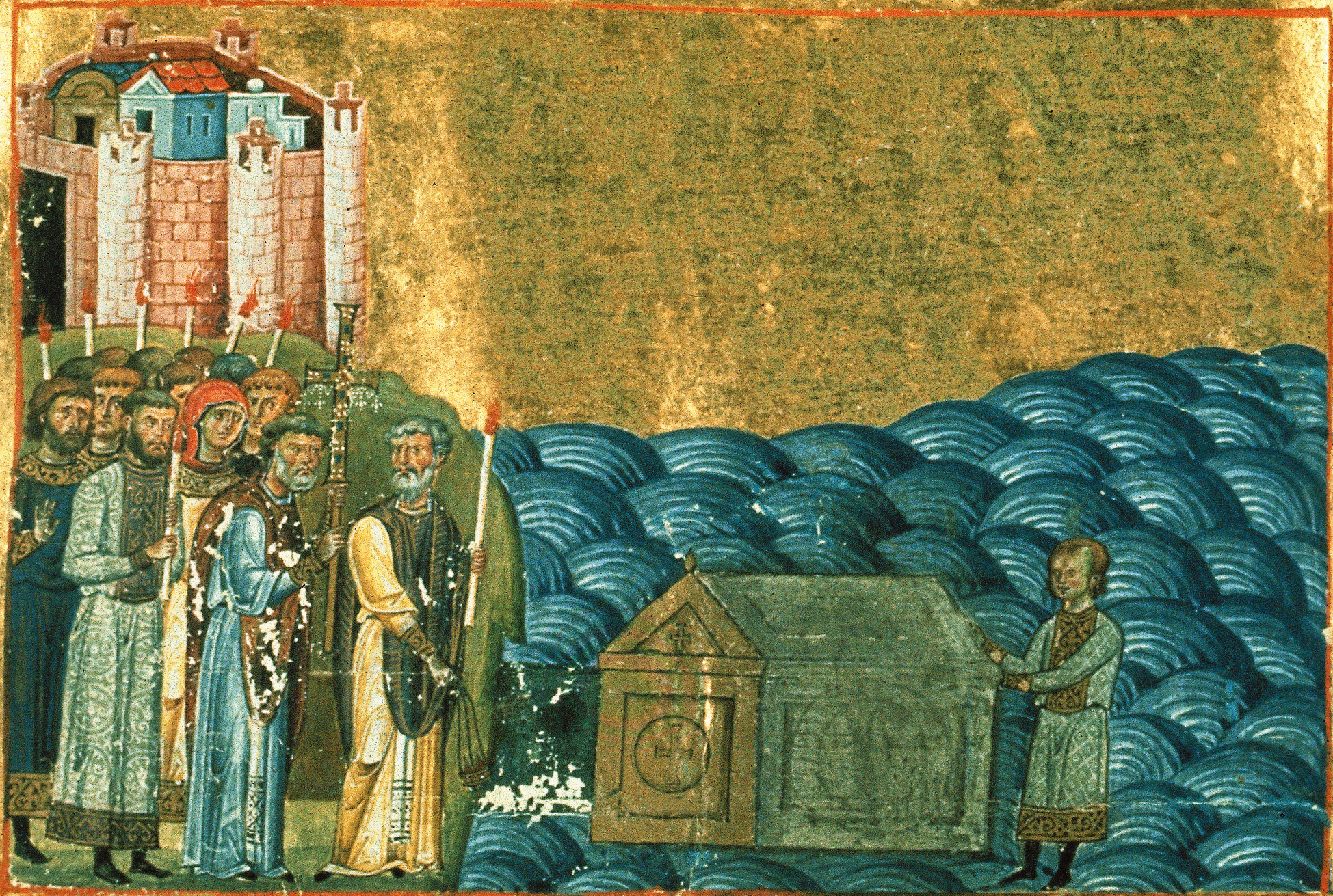 Обретение мощей Климента Римского близ Херсонеса. Миниатюра из Менология императора Василия II. XI в. // Finding of relics of pope Clemens I